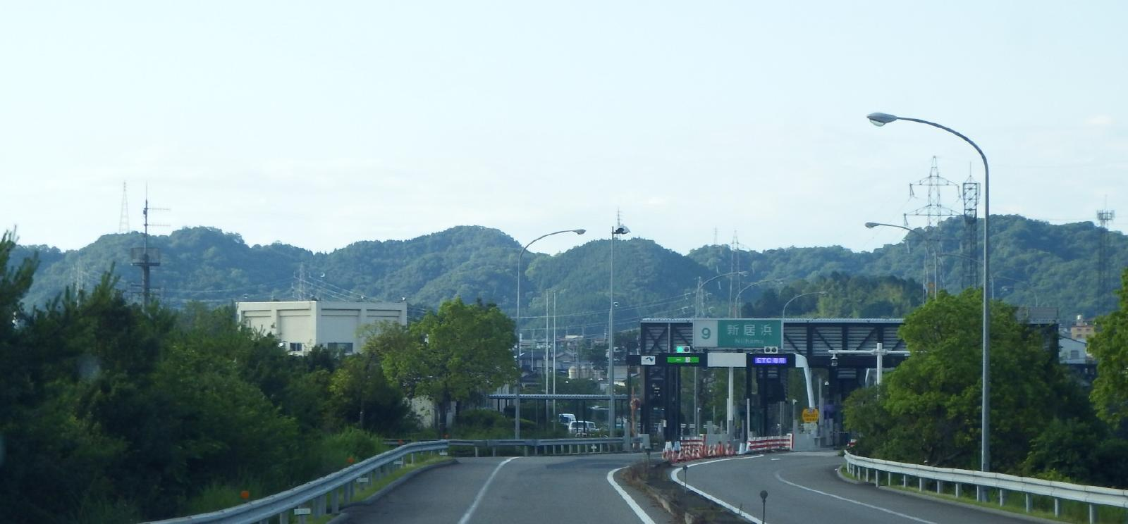 新居浜インターチェンジの降り口